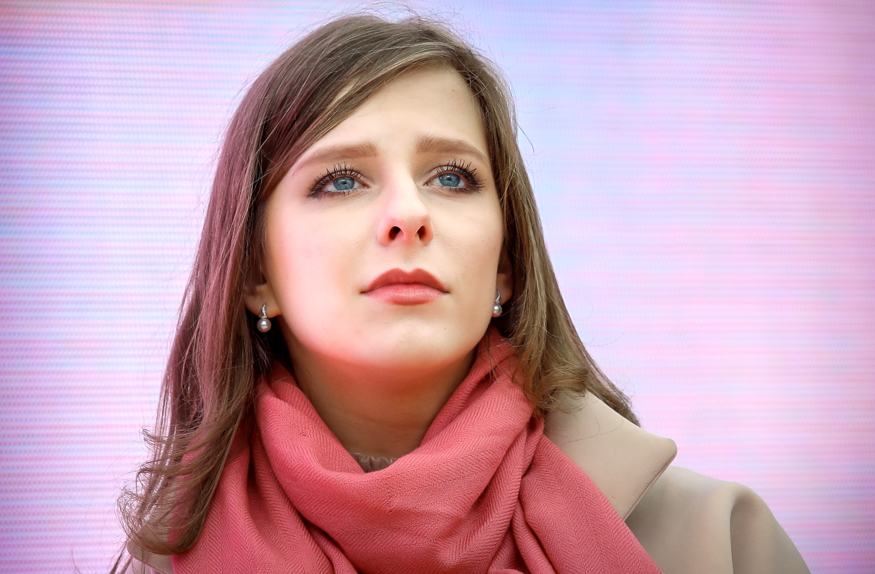 Елизавета Арзамасова (актриса) на книжном фестивале "Красная площадь"-2017.